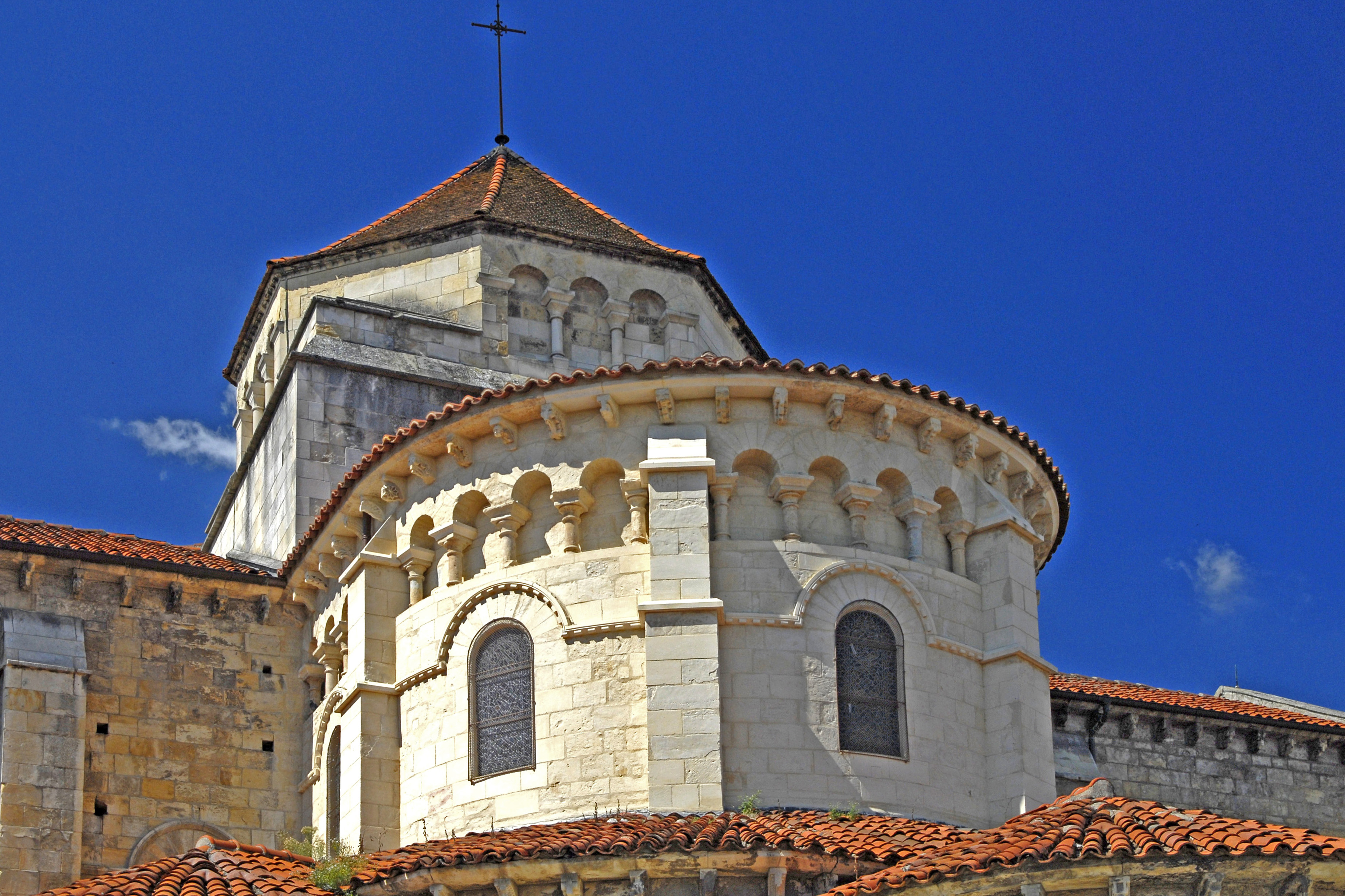 St.-Etienne Nevers, Chorapsis